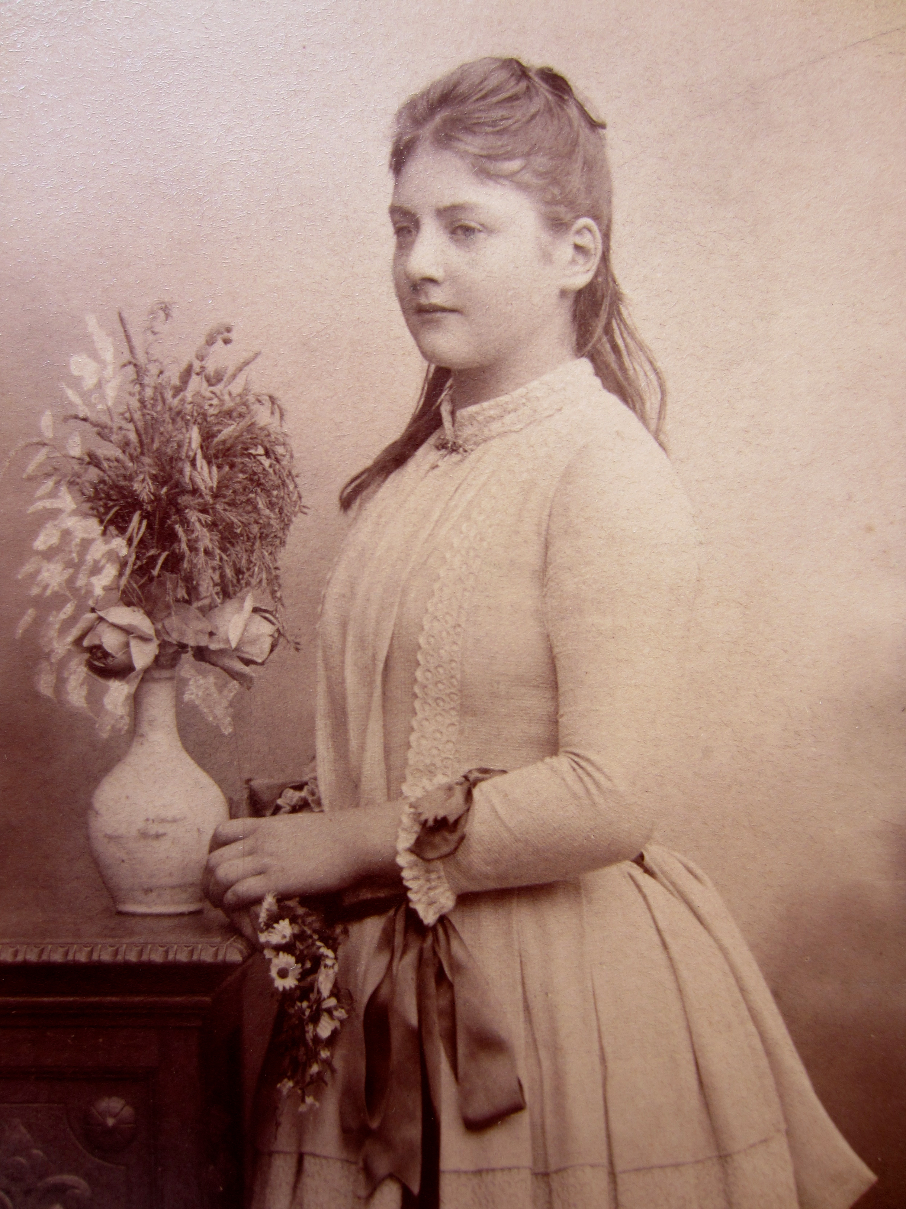 Märta Abenius, cirka 1886. Hjalmar Söderbergs första hustru. Orginalfoto av kongl. hof-fotograf Selma Jacobsson, Fredsgatan 15, Stockholm.